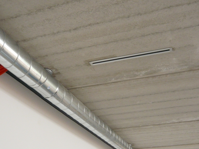 Bei einer Lüftungsdecke ist das gesamte System für die Be- und Entlüftung des Raumes in das Bauteil integriert. Lediglich die Lüftungsauslässe sind sichtbar.